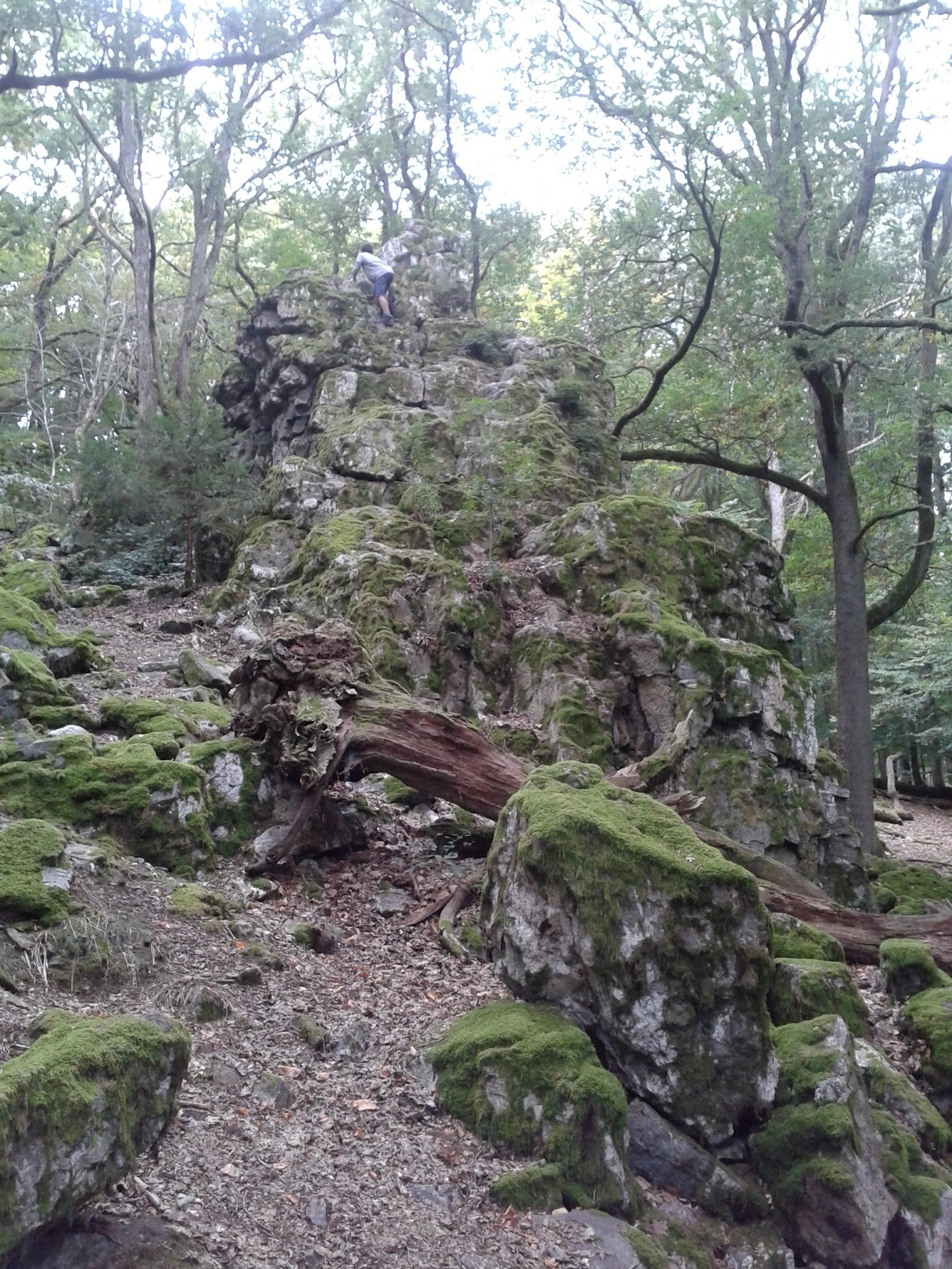 Berg Goldgrube: Blick von Südwesten zum Goldgrubenfelsen (Taunus-Quarzit-Felsengruppe aus dem Unter-Devon), der als Naturdenkmal (ND 57) geschützt ist; Bad Homburg vor der Höhe im Hochtaunuskreis, Hessen